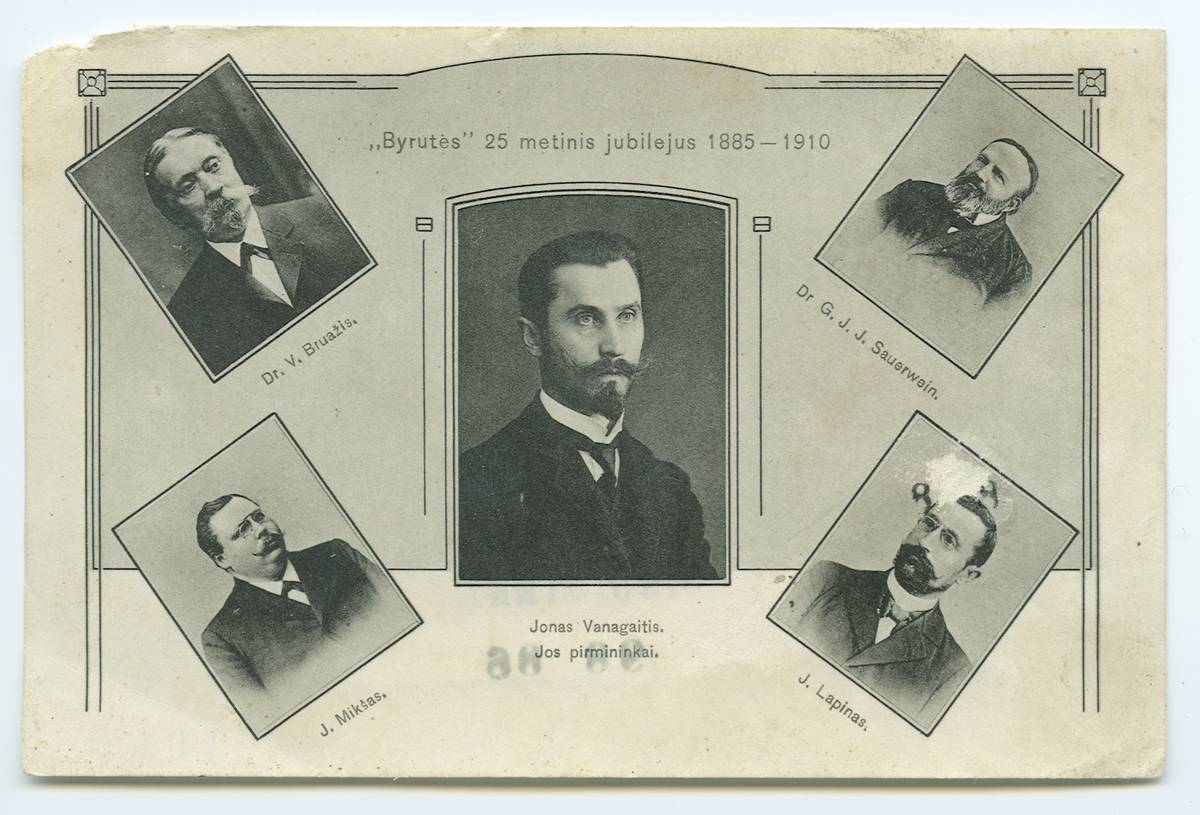 Birutės pirmininkai. Birutė – pirmoji tautinė Mažosios Lietuvos lietuvių draugija, veikusi 1885–1914 m.